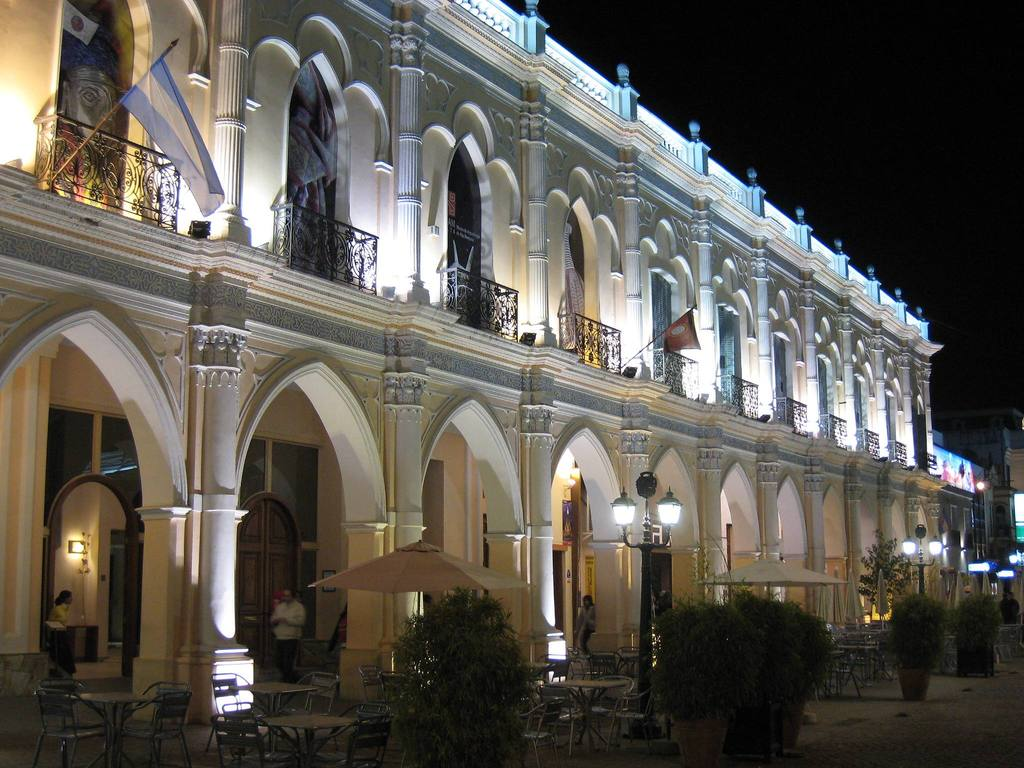 Museo de Arqueología de Alta montaña en la provincia de Salta